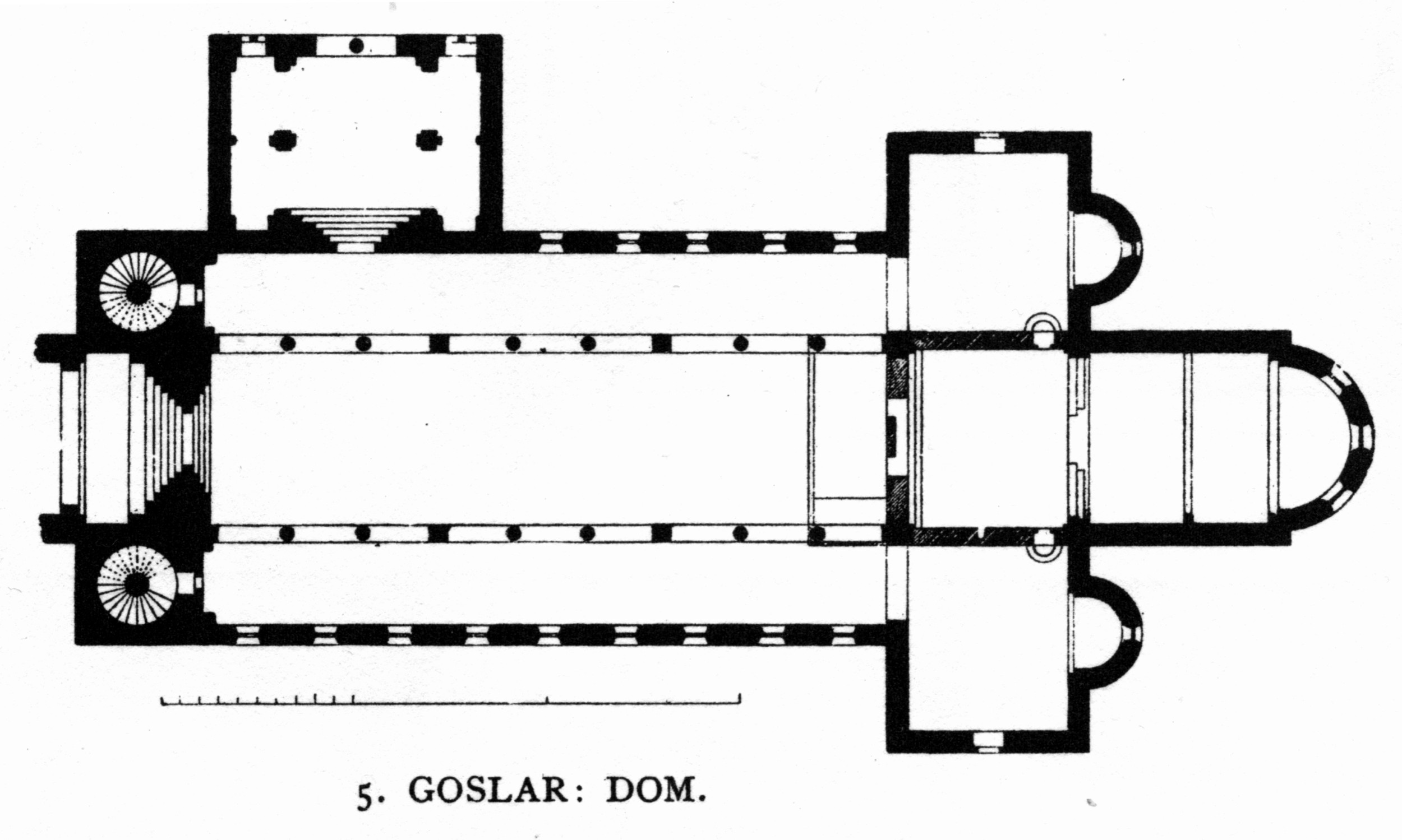 Goslar, Dom. Floor plan.